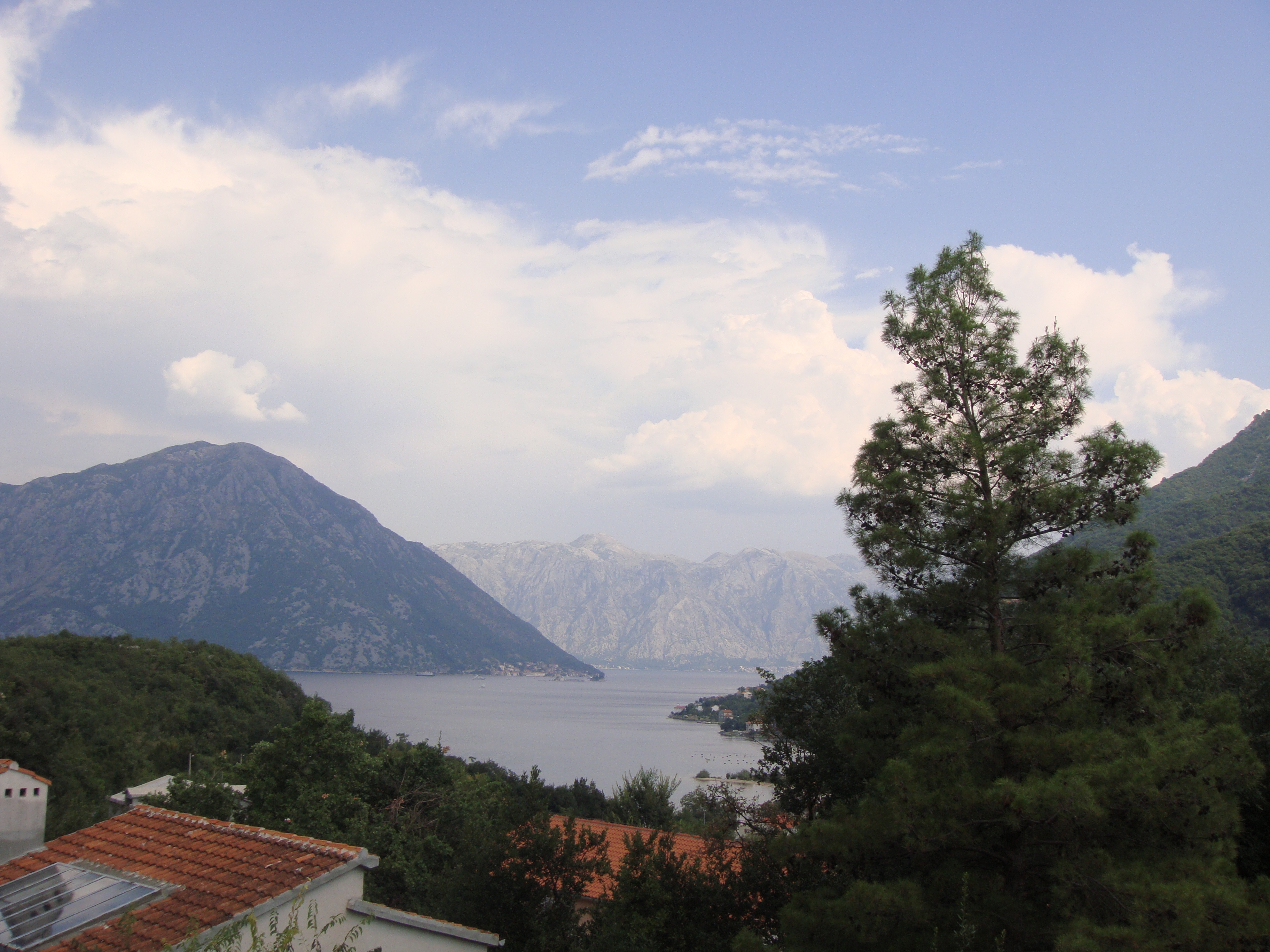 Lipci, Montenegro